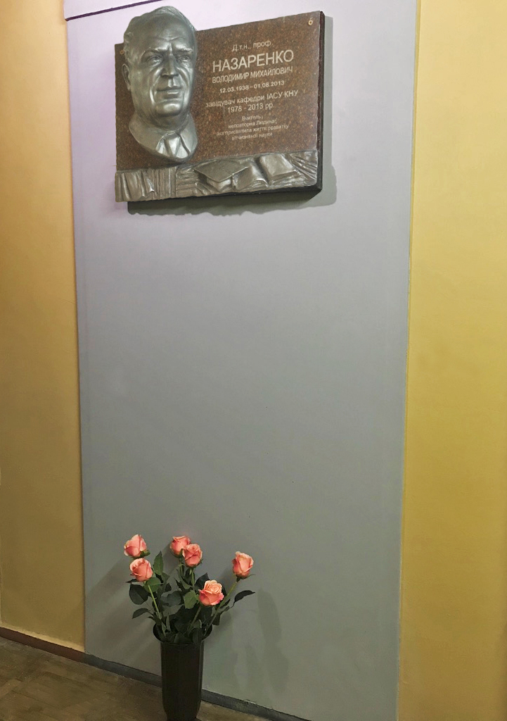 Меморіальна дошка вшанування пам’яті Назаренко В.М., КНУ, м. Кривий Ріг